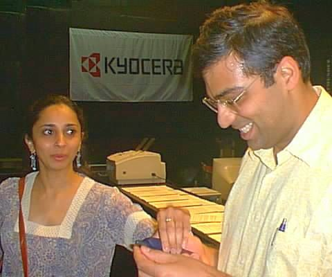 Ehepaar Aruna und Viswanathan Anand, Dortmunder Schachtage 2004.